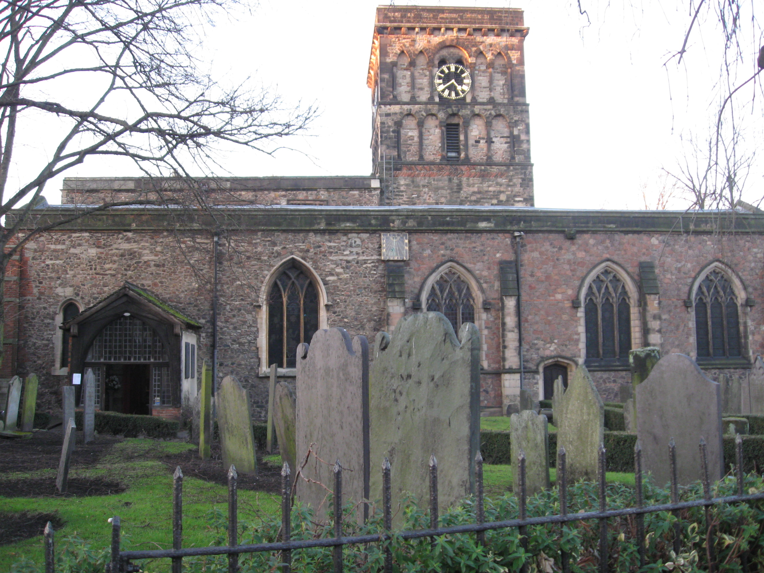 Saint Nicholas Church